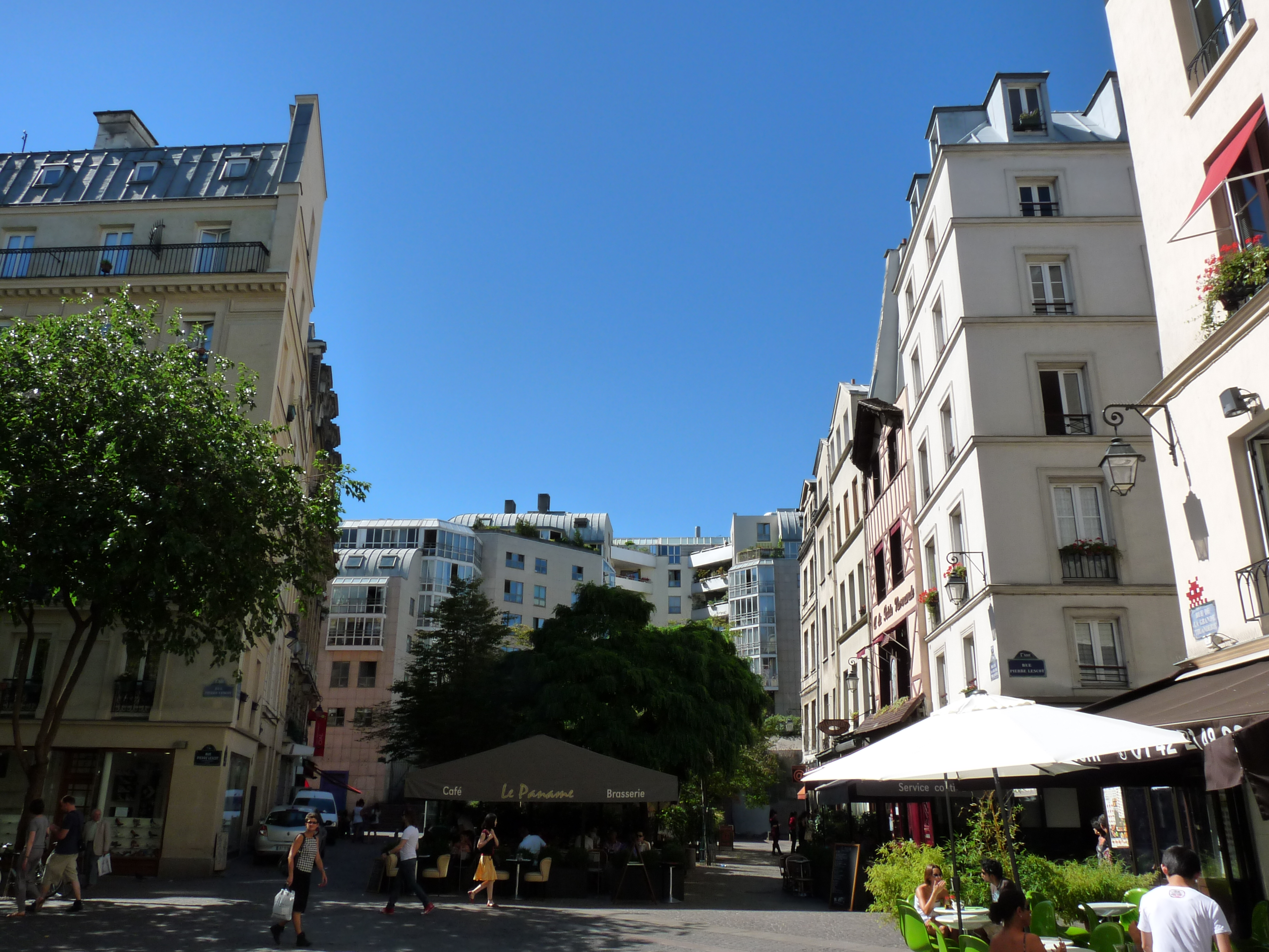 Les rues de la Petite Truanderie (la partie gauche du square) et de la Grande Truanderie (la partie droite du square) à Paris